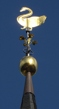 Detail van de torenspits van de Evangelische kerk in Monschau